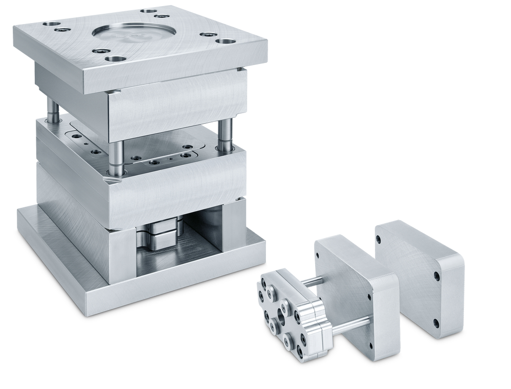 Wechselformen sind die ideale Lösung zur schnellen und kostengünstigen Realisierung von Kleinserien und Prototypen